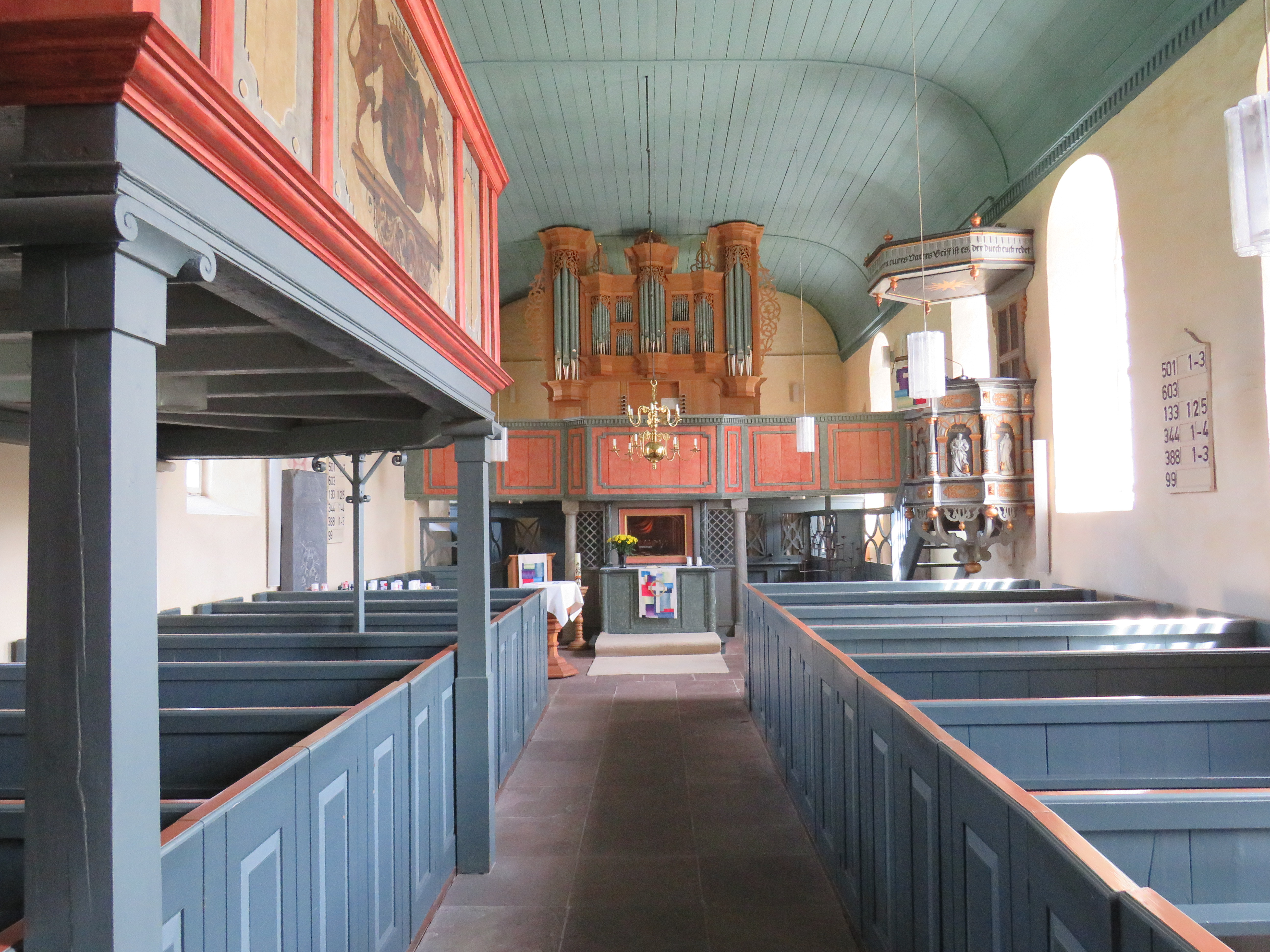 Logabirumer Kirche innen